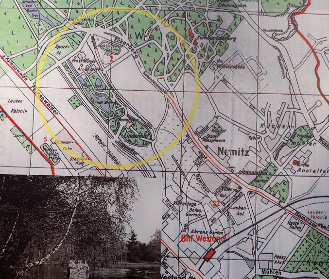 Fragment mapy Szczecina z 1931 roku (żółty okrąg - teren tworzenia obiektu Serenie Stawy)